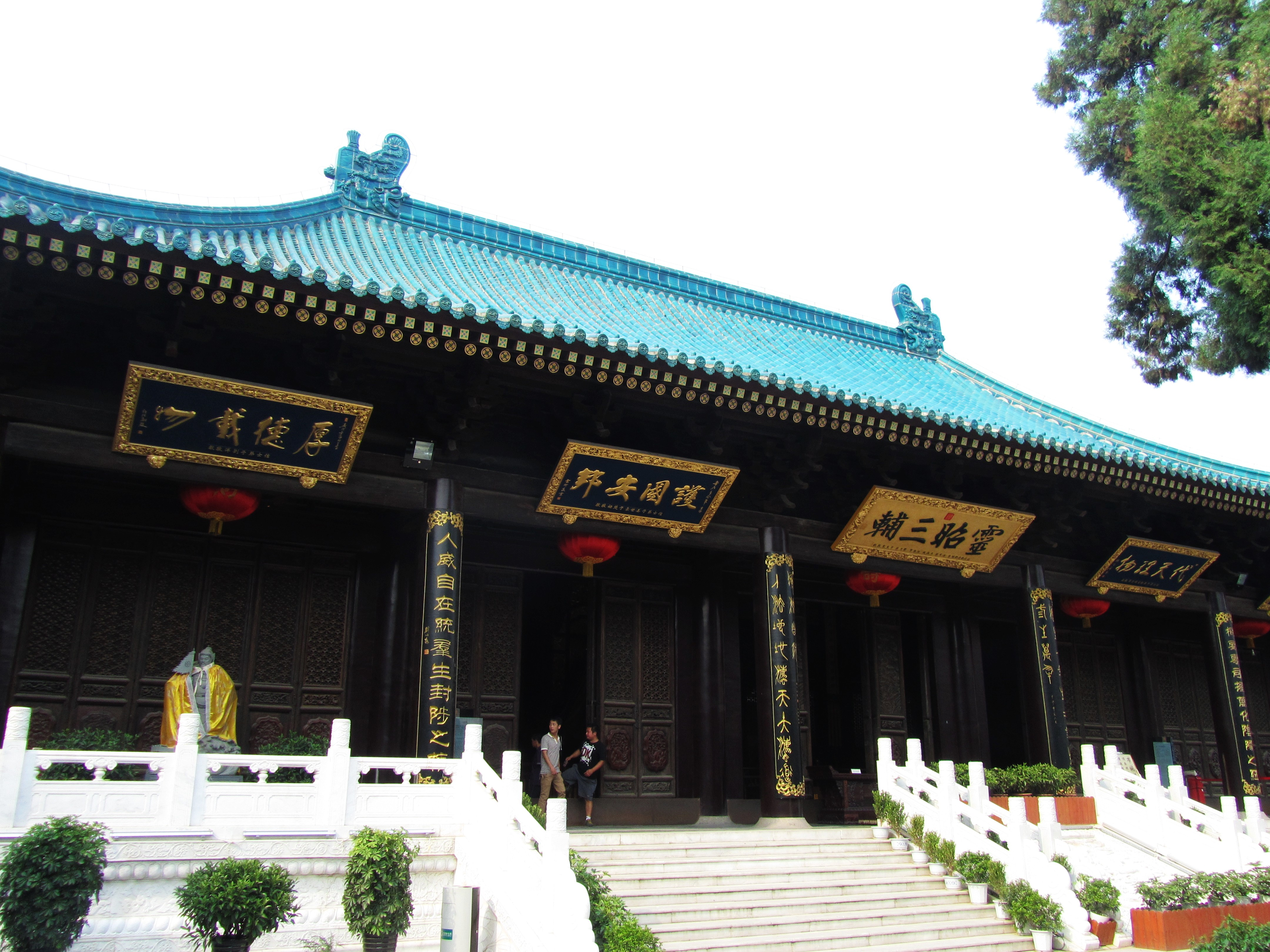 西安都城隍庙，大殿。